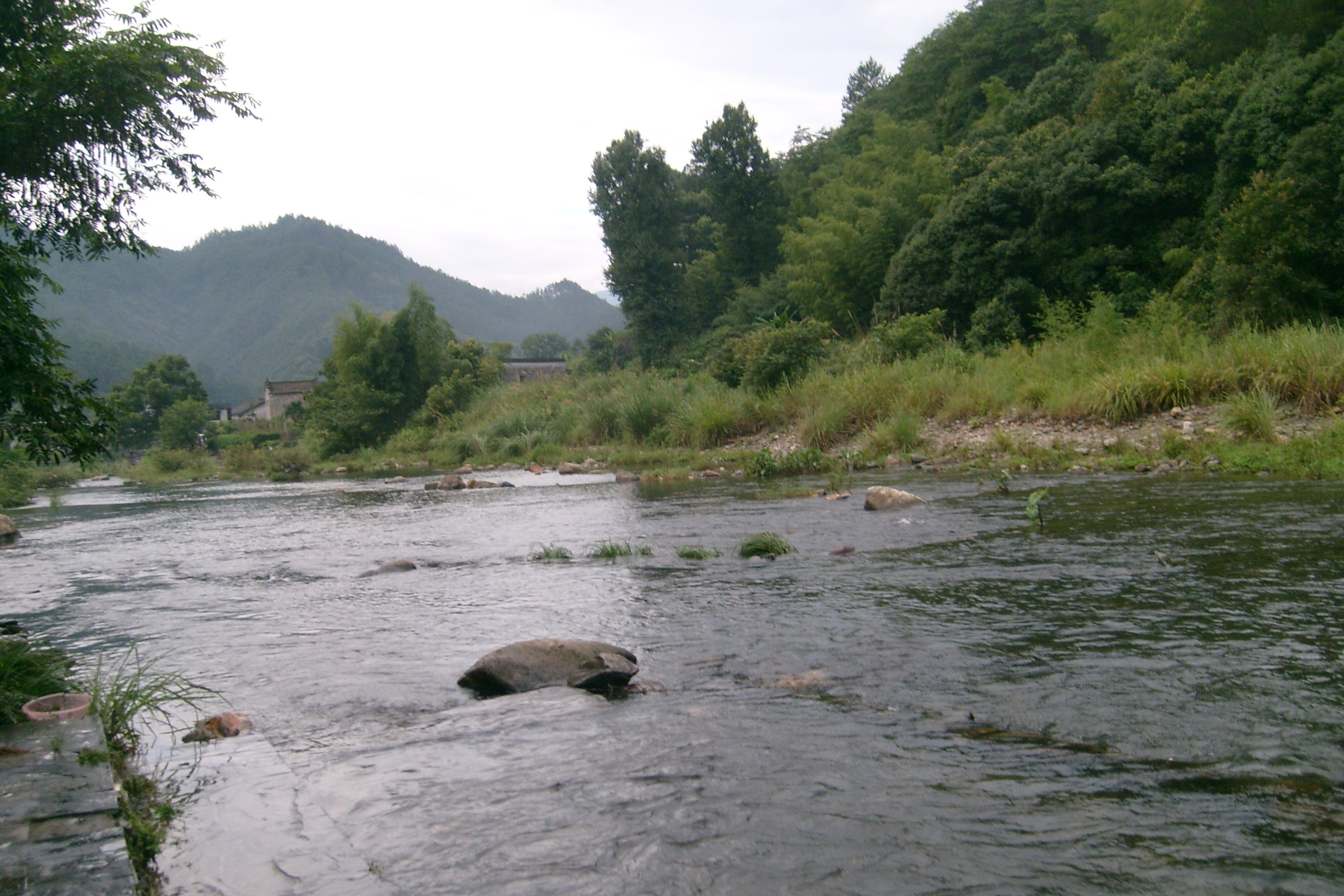 瑶里镇的青山绿水